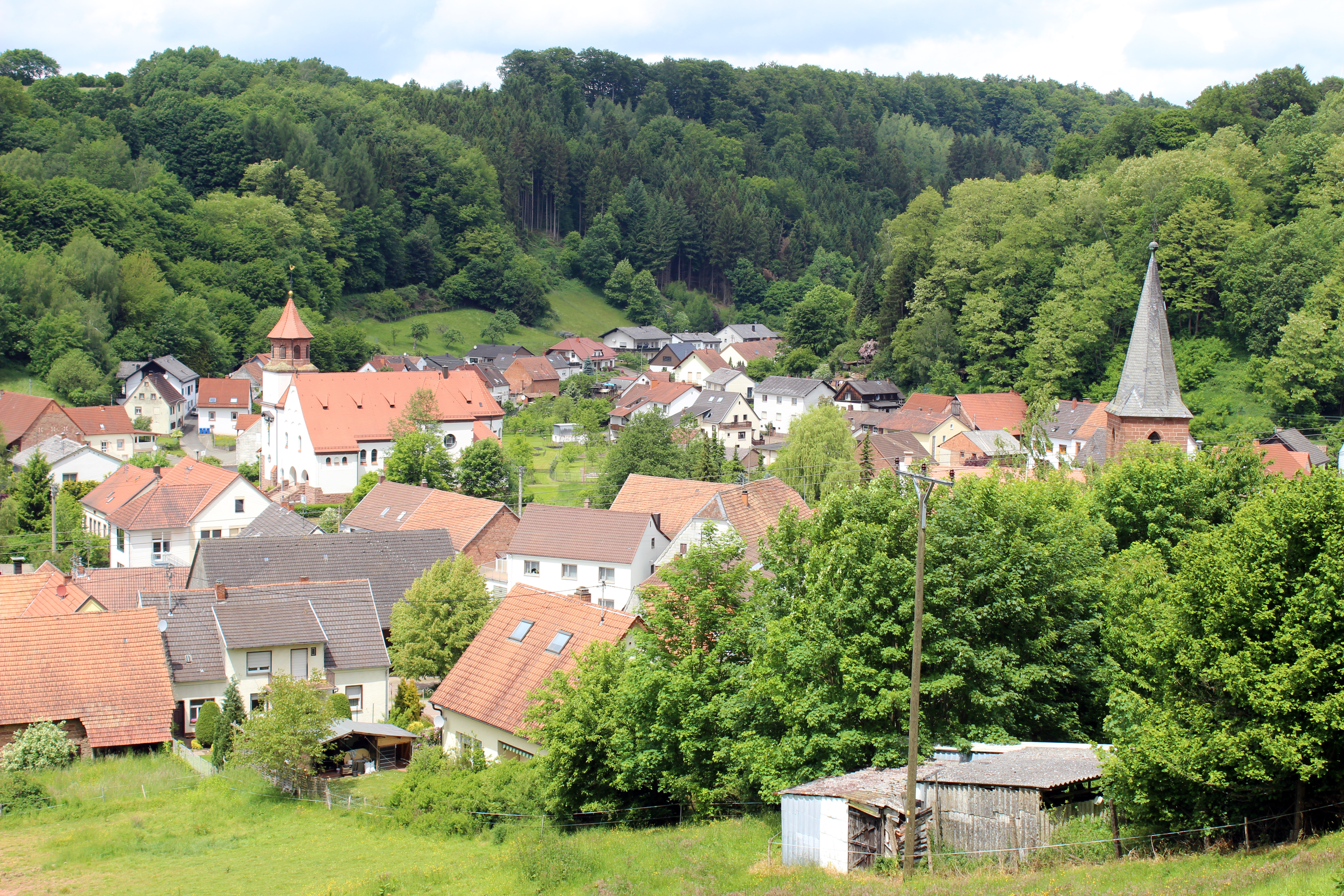 Ansicht von Wiesbach (Pfalz), Landkreis Südwestpfalz, Rheinland-Pfalz